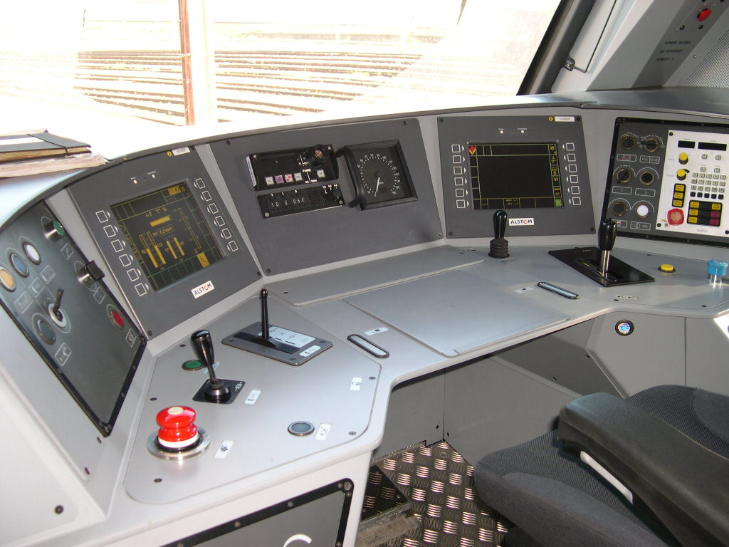 Pupitre central BB 27000